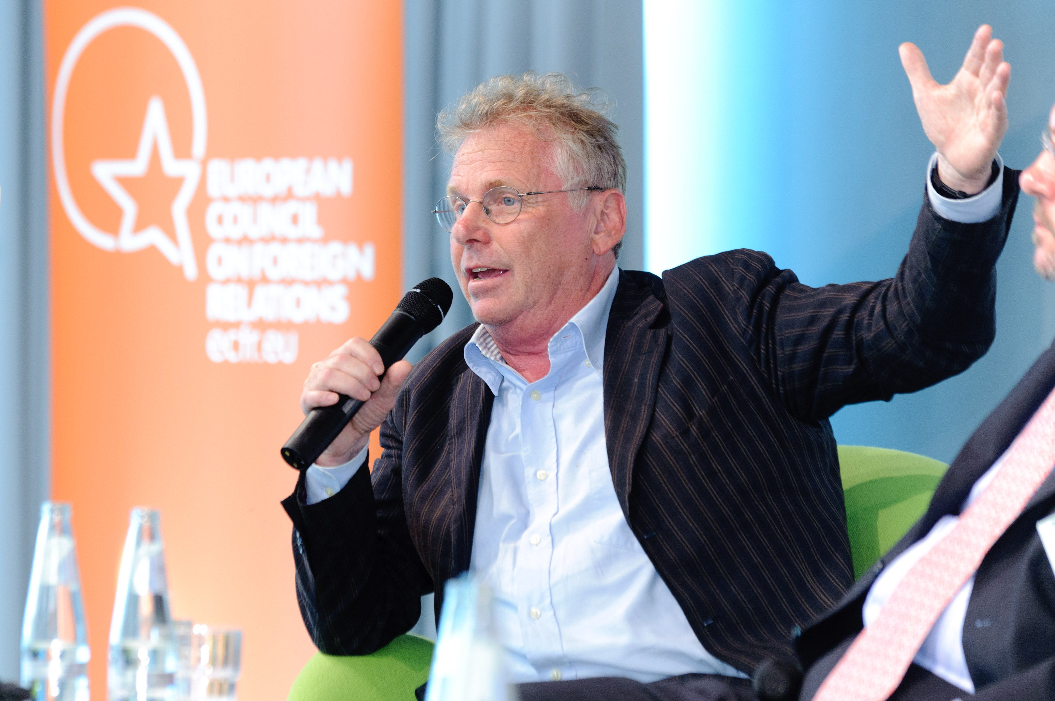 Daniel Cohn-Bendit (MdEP, Die Grünen/EFA, Brüssel)